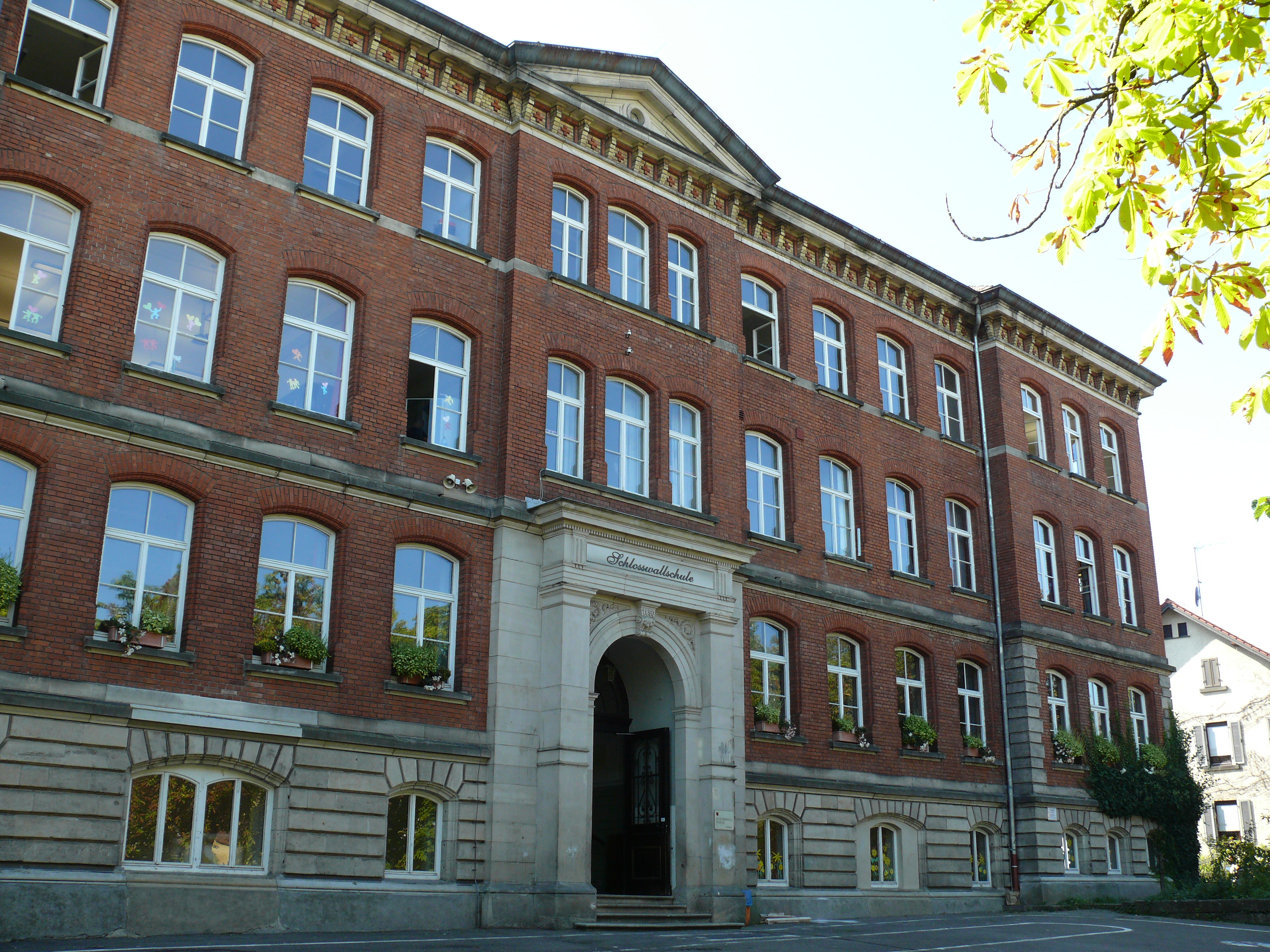 Das Gebäude "Archivstraße 14" (Schlosswallschule) in Schorndorf, Rems-Murr-Kreis.